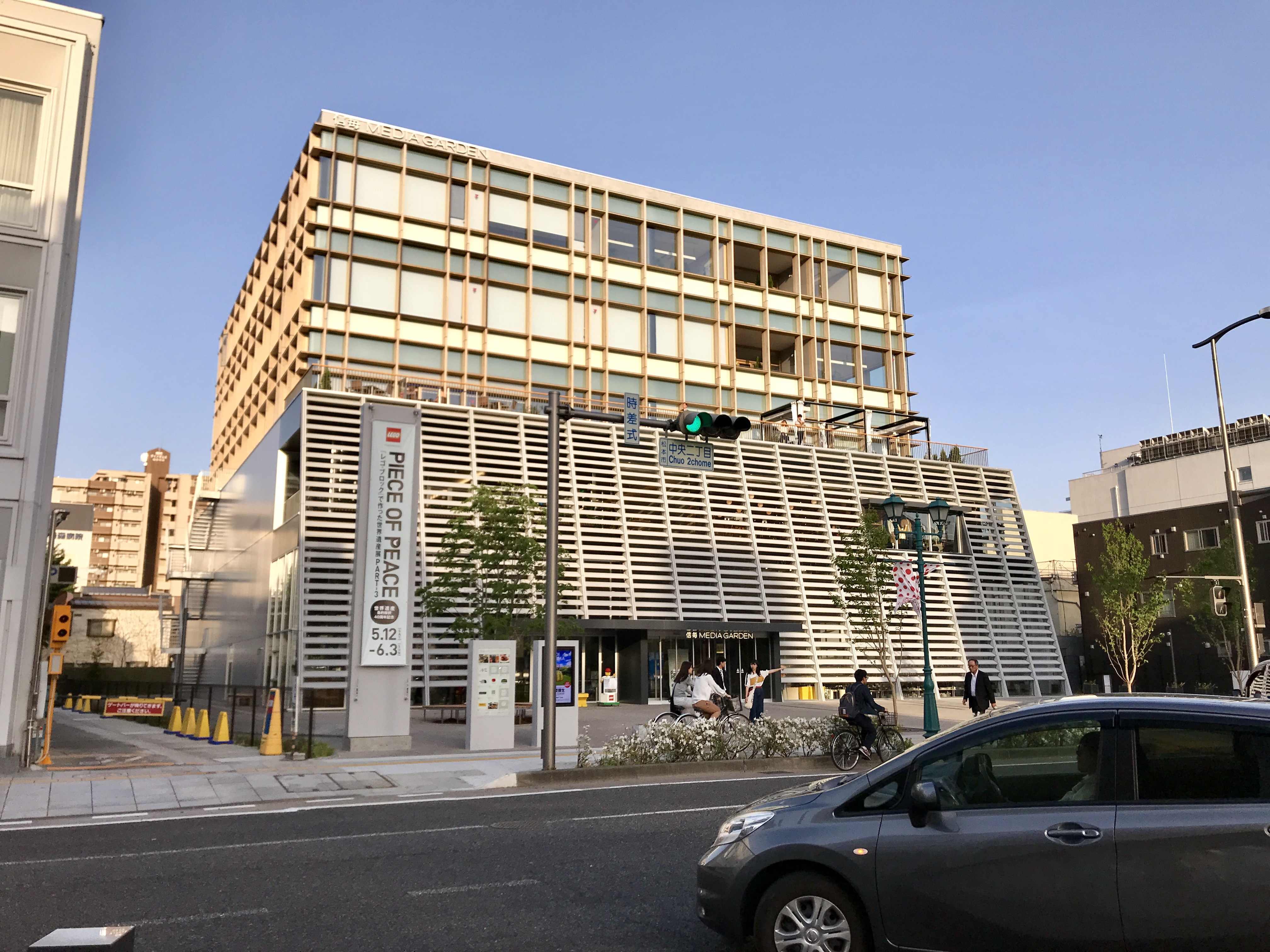 複合施設、信毎メディアガーデン。